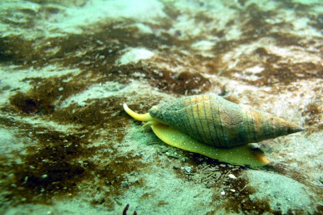 Megasurcula carpenteriana